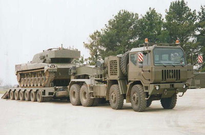 Autocarro trasporto carri armati, esercito italiano